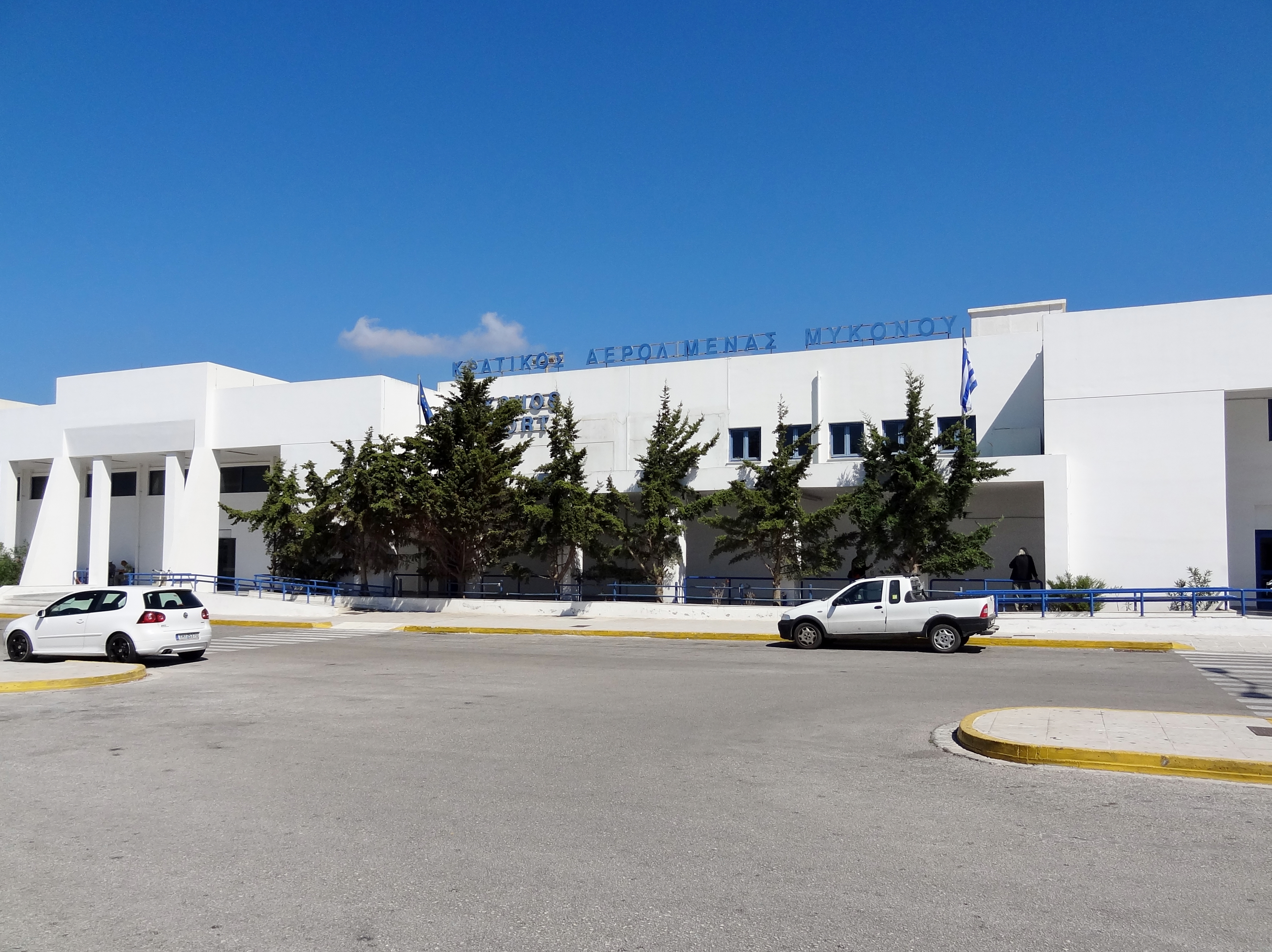 Flughafen auf Mykonos, Kykladen, Griechenland